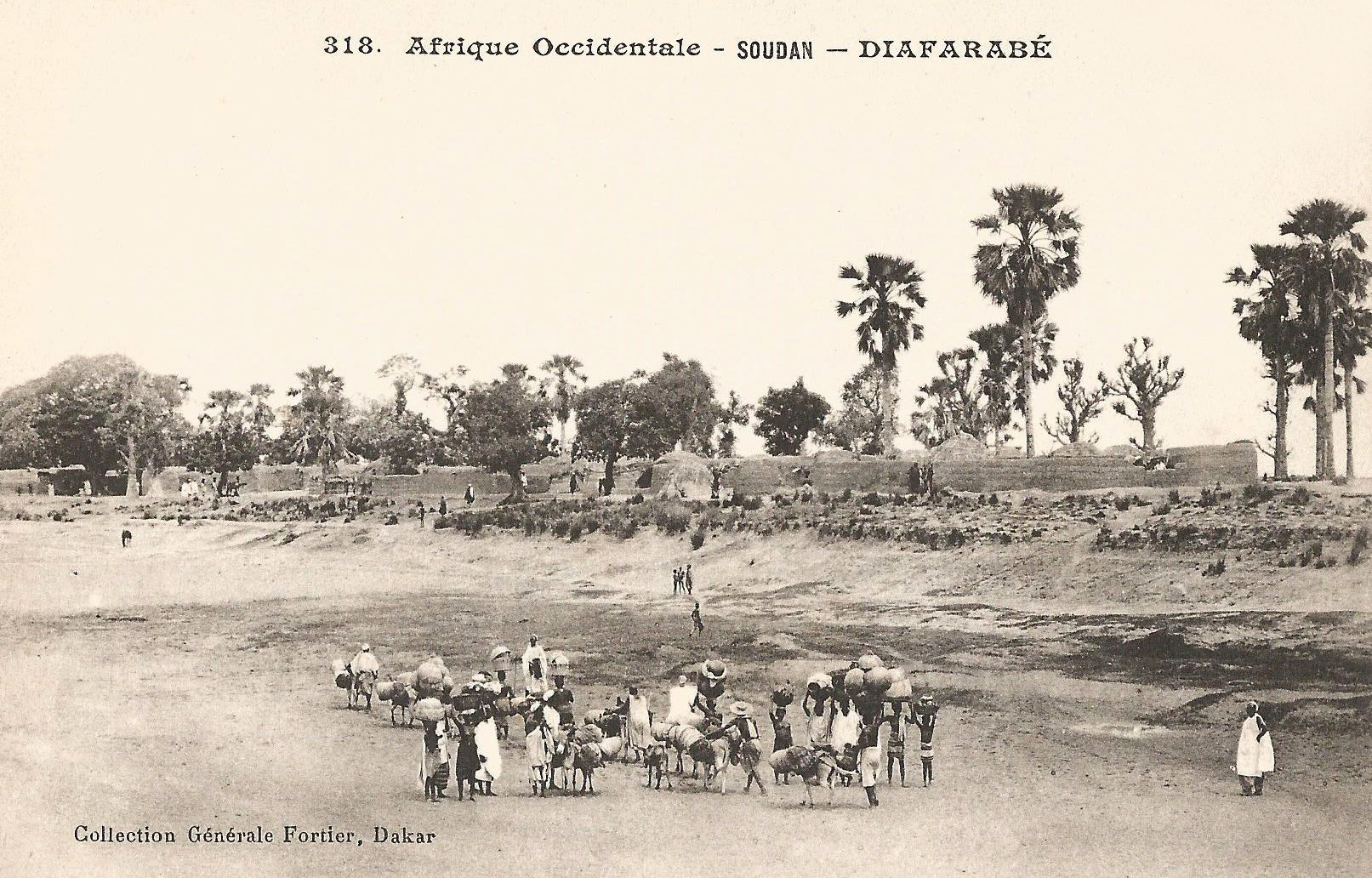 François-Edmond Fortier, Diafarabé. Afrique Occidentale - Soudan.